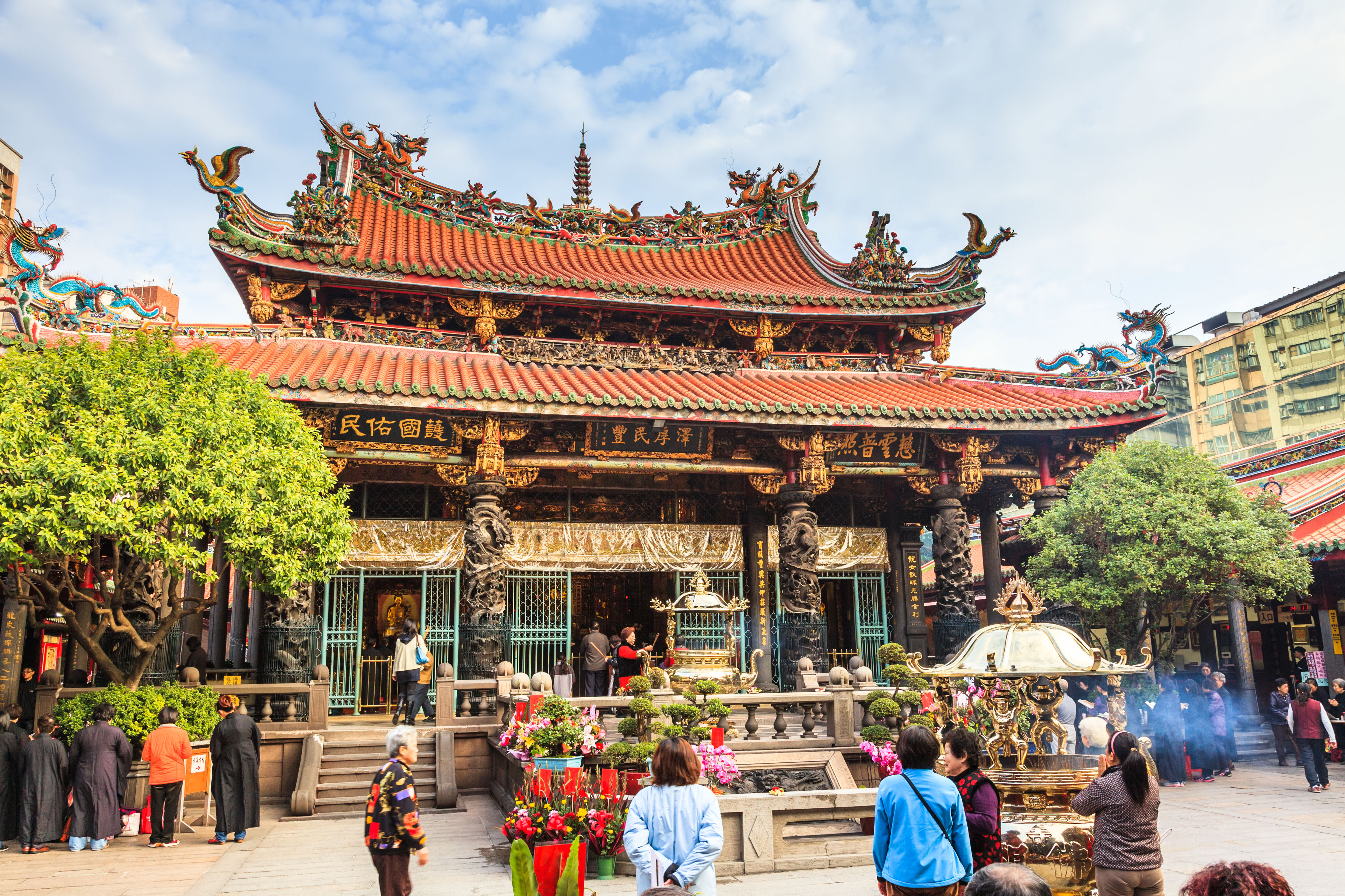 艋舺龍山寺位於台北市萬華區廣州街與西園街交叉口、毗鄰華西街觀光夜市，是萬華的信仰中心，艋舺龍山寺可稱萬華龍山寺或簡稱龍山寺，悠久的歷史訴說著昔日『一府二鹿三艋舺』的風華，艋舺龍山寺於清朝乾隆3年(西元1738年)由泉州三邑移民將福建晉江安海龍山寺觀世音菩薩分靈至台灣所興建，後來雖發生大地震和暴風雨等天災侵襲，歷經修復後風格與艋舺清水巖祖師廟相近，1945年歷經第二次世界大戰全毀，修復後列入國家二級古蹟。